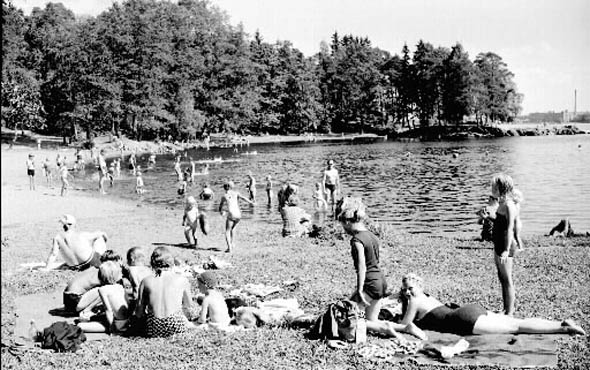 Pyynikin uimarantaa vuonna 1959